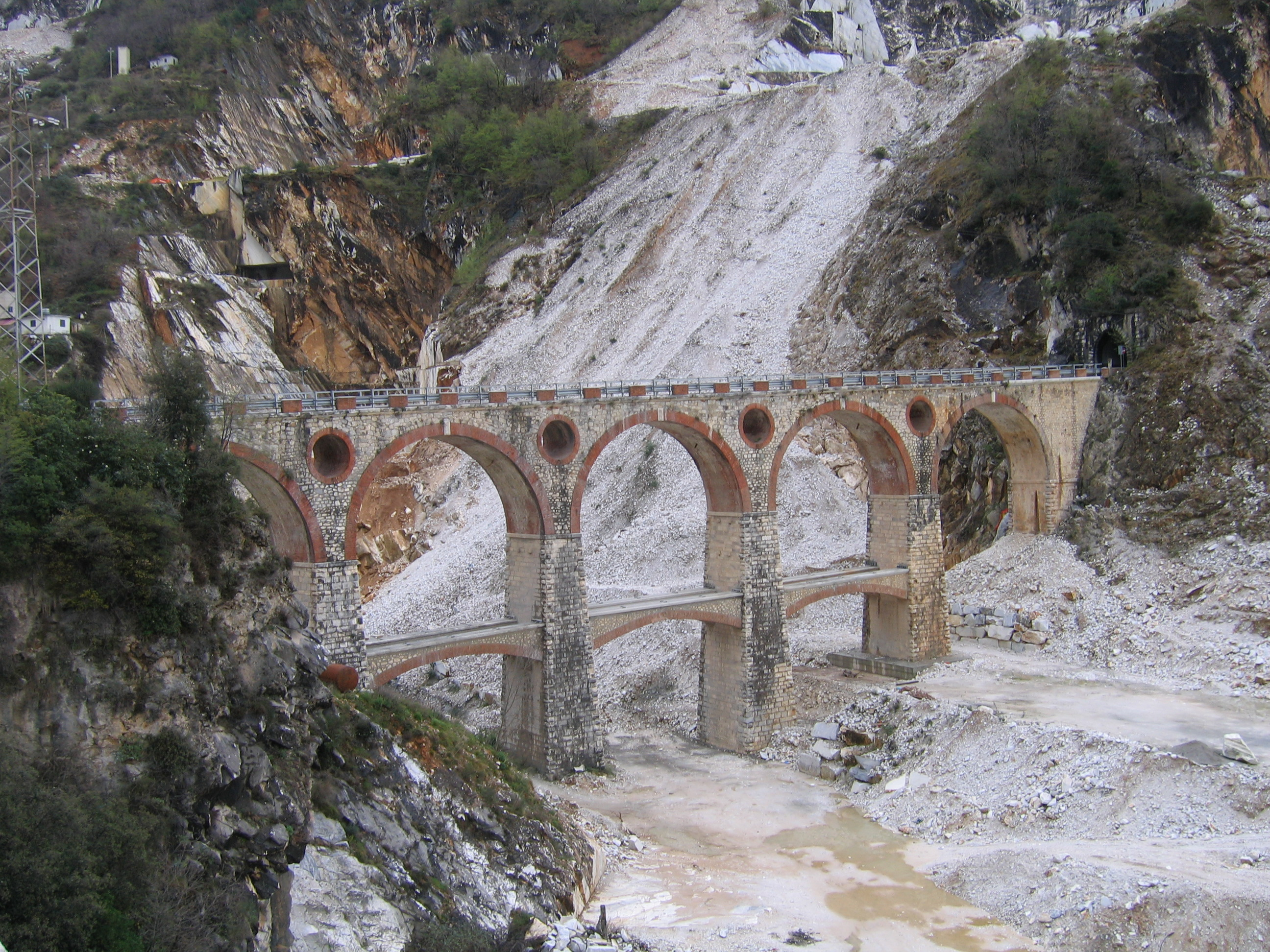 Ponti di Vara della Ferrovia Marmifera di Carrara.